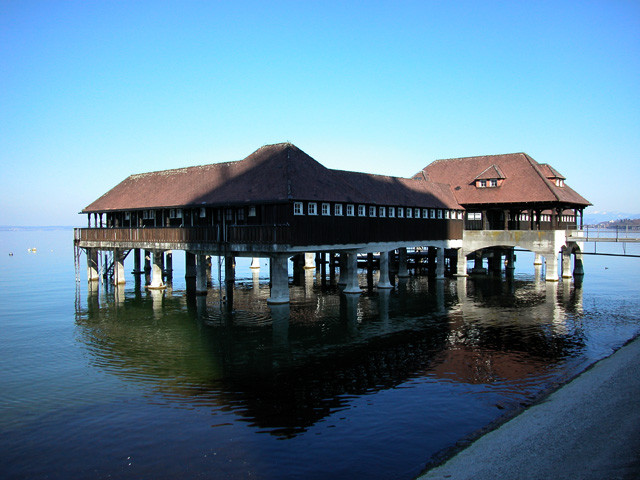 Badhütte Rorschach, Schweiz